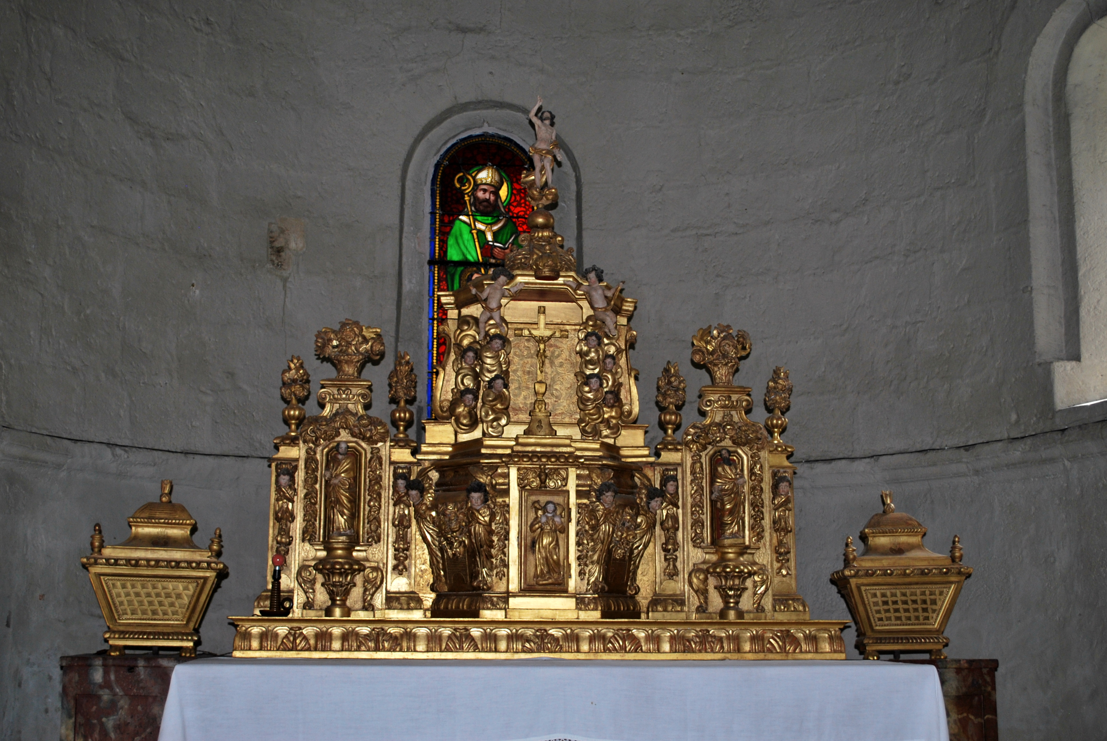 Saint-Morillon, église Saint-Maurille